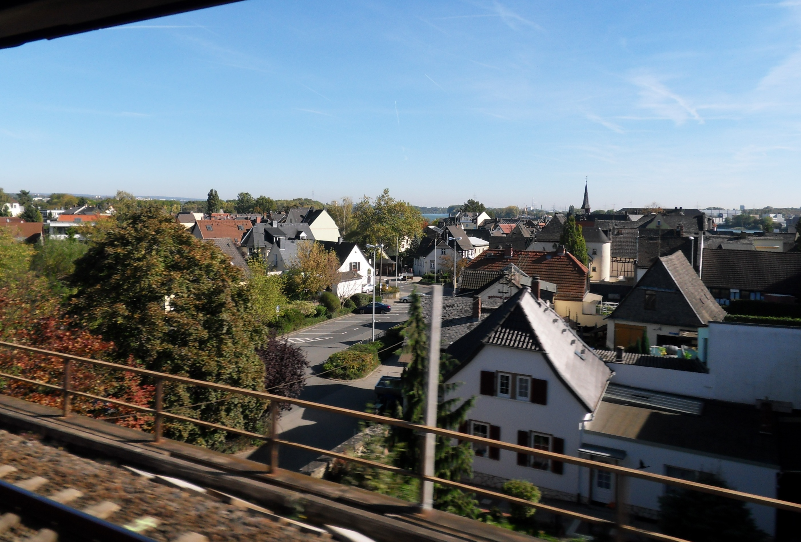 Aussicht von der Brücke der Rechten Rheinstrecke über die Walluf am Bahnhof Niederwalluf im Rheingau; im Hintergrund der Rhein